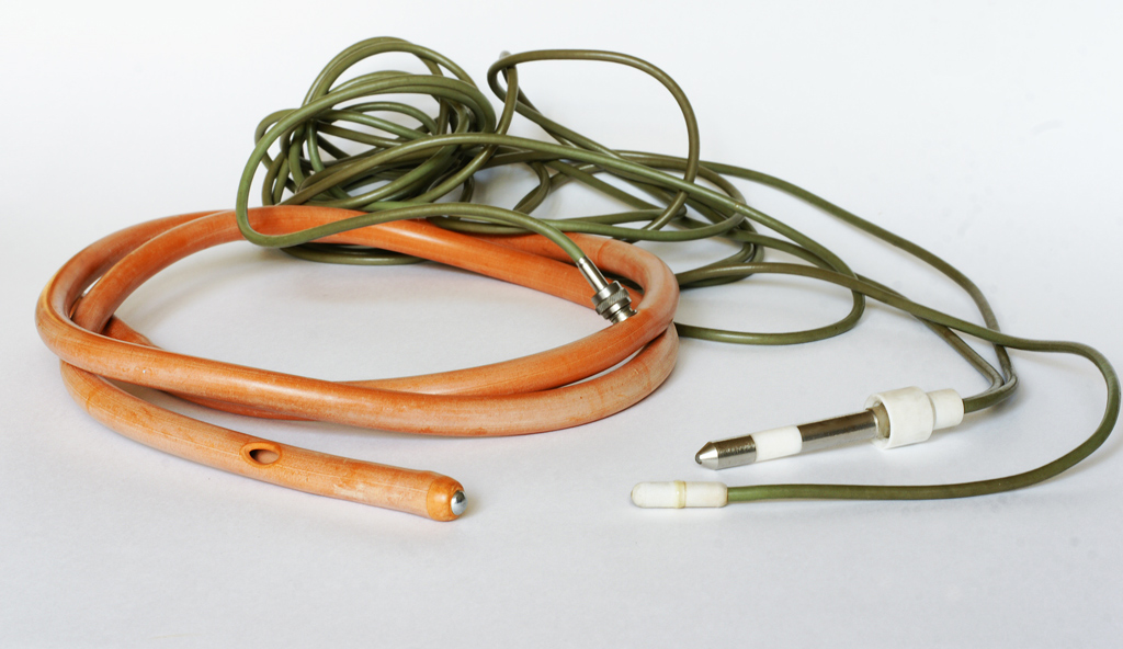 Интраоперационный рН-зонд, применяемый для контроля полноты проксимальной селективной ваготомии